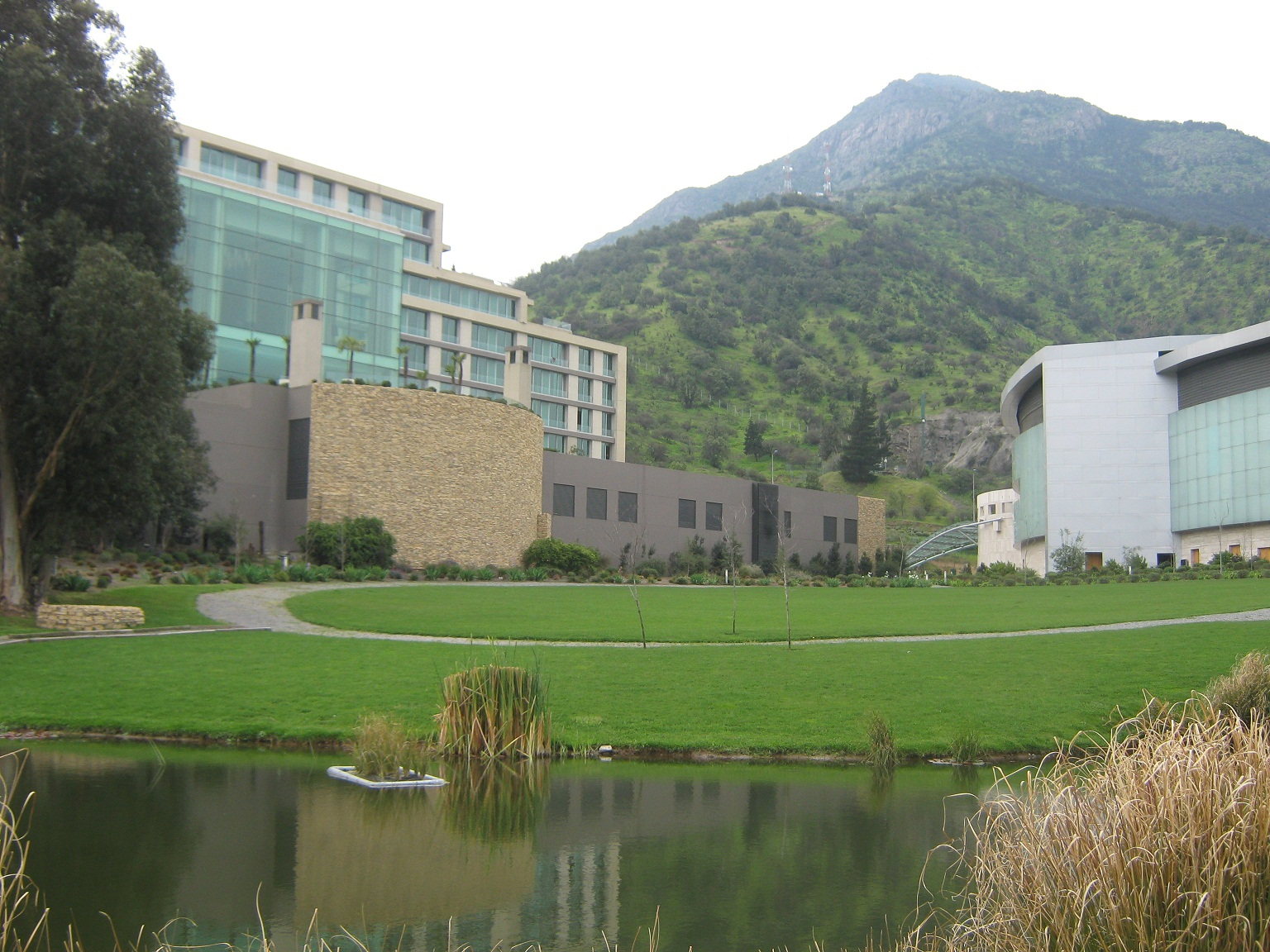 Hotel Monticello, im Hintergrund der Berg Challay, San Francisco de Mostazal